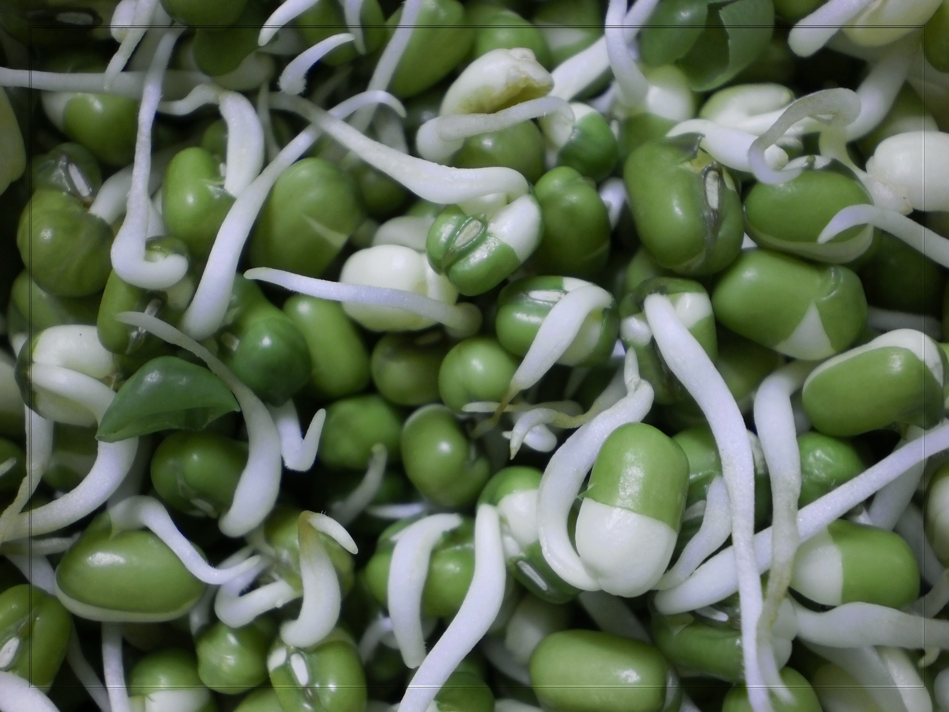 മുളപ്പിച്ച ചെറുപയര്‍